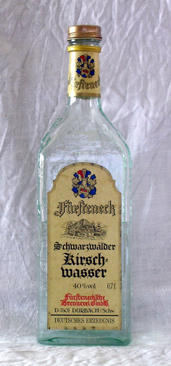 Kirschwasser from Schwarzwald (Black Forest), Germany.